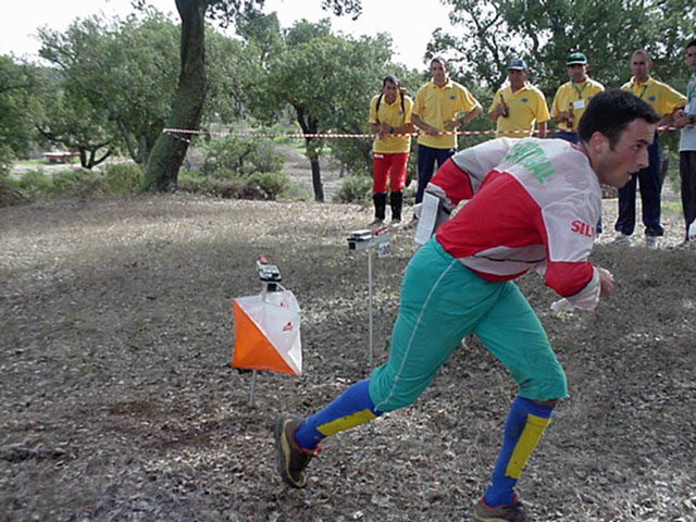 Description